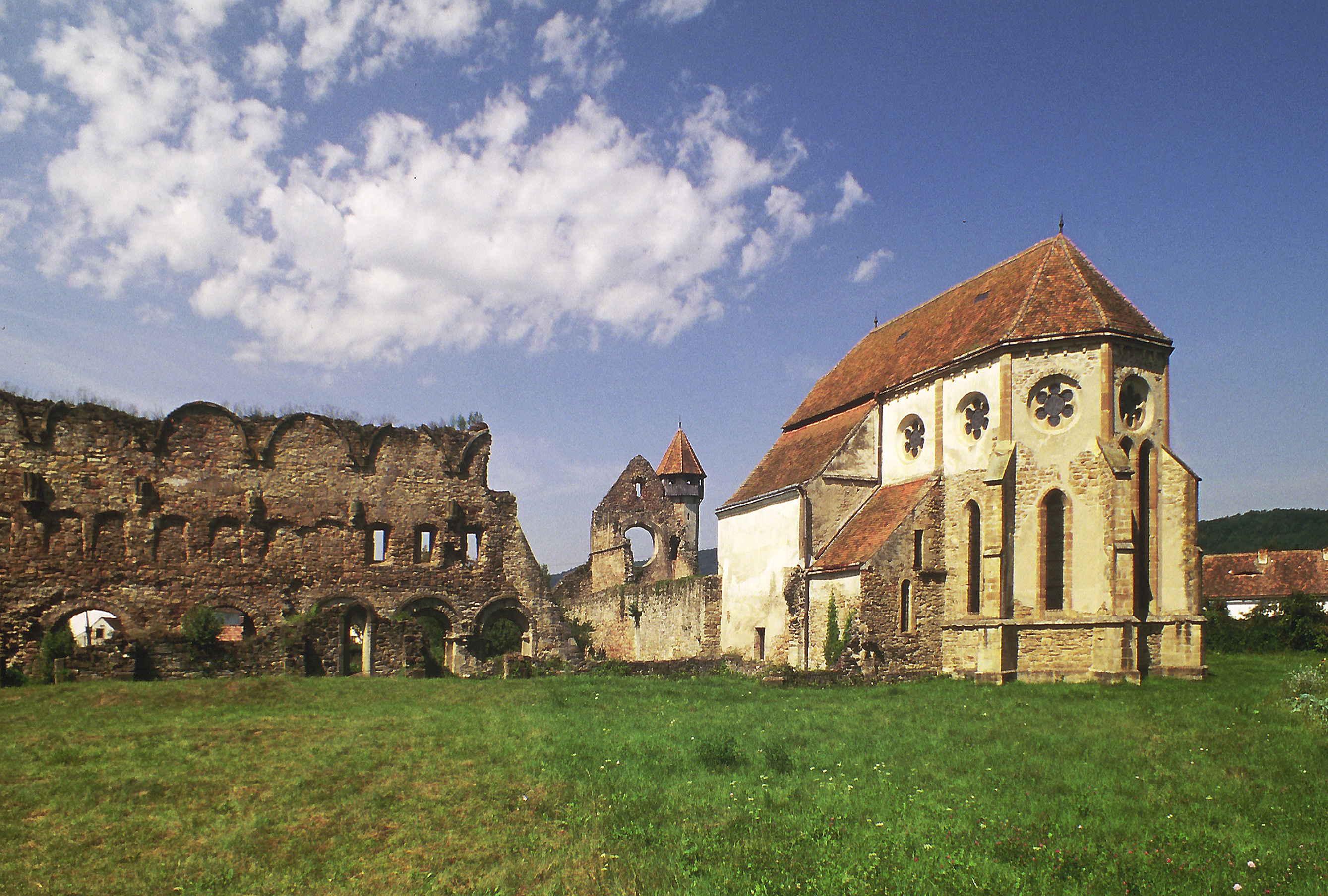 Die ehemalige Zisterzienserabtei in Kerz (Siebenbürgen, Rumänien) wurde um das Jahr 1200 gegründet und 1474 von König Mathias Corvinus aufgelöst. Heute ist sie ev. Kirche.